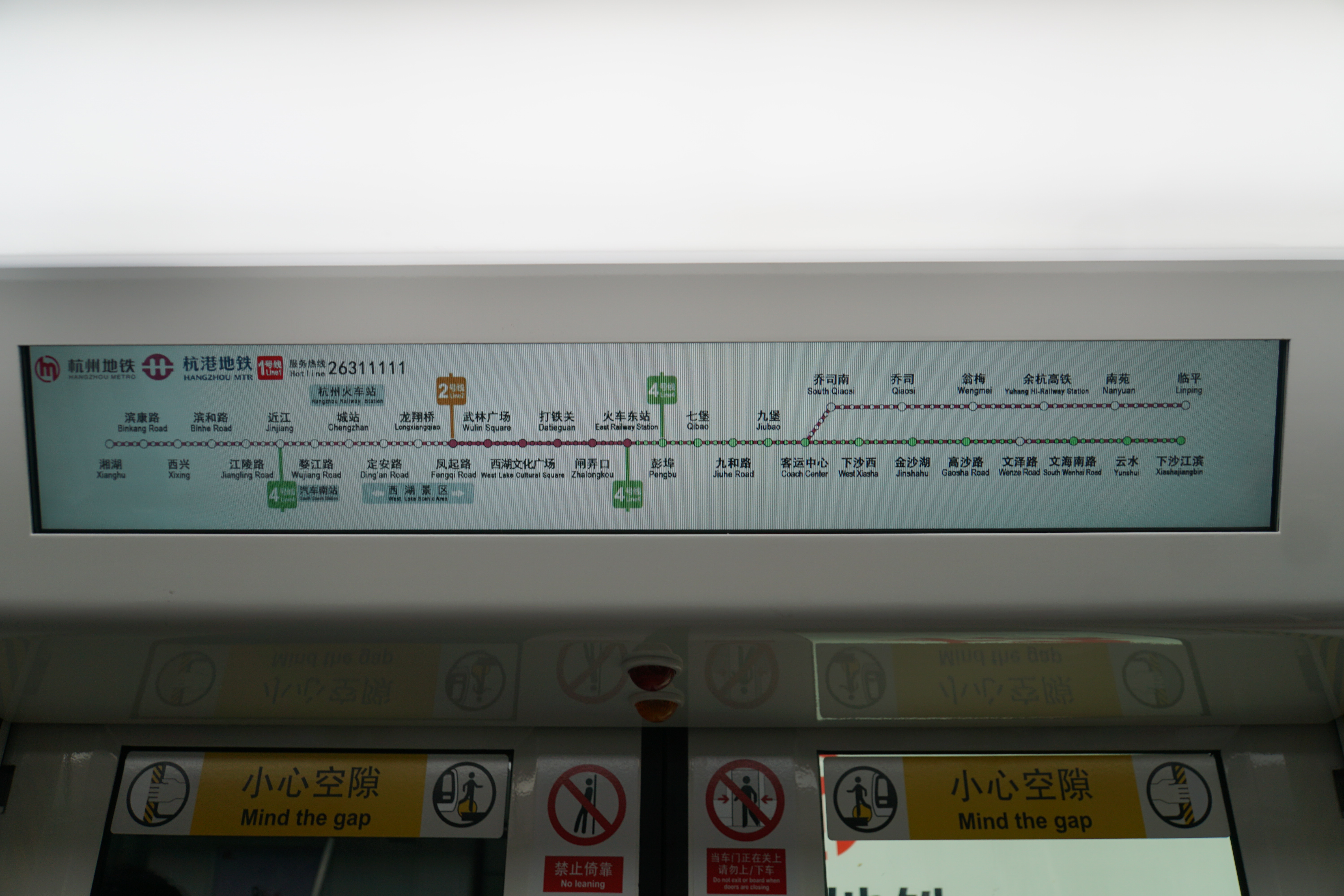 杭州地铁1号线新车LCD屏幕路线图